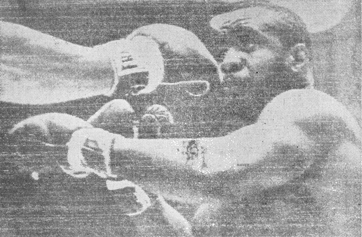 東亜日報 1964年2月26日